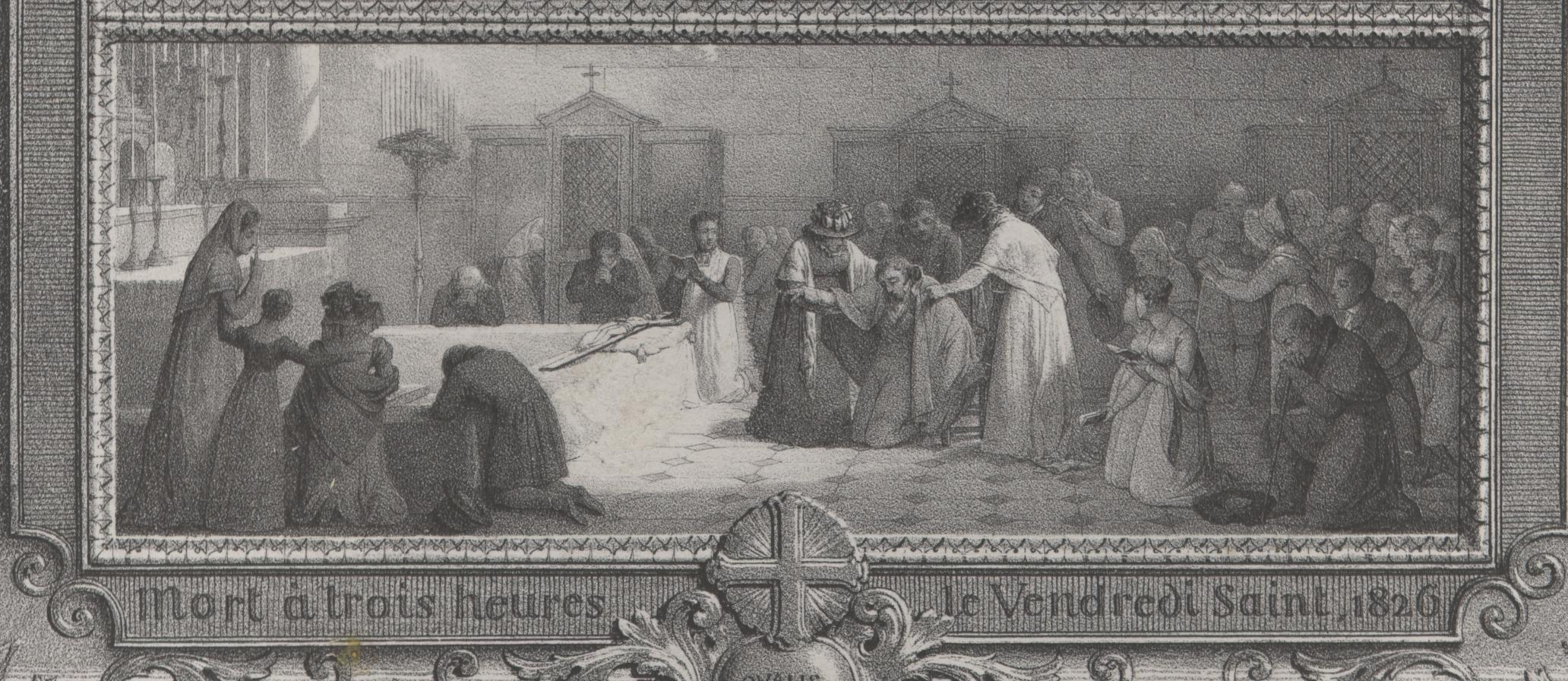 Tod von Mathieu de Montmorency-Laval, franz. Außenminister